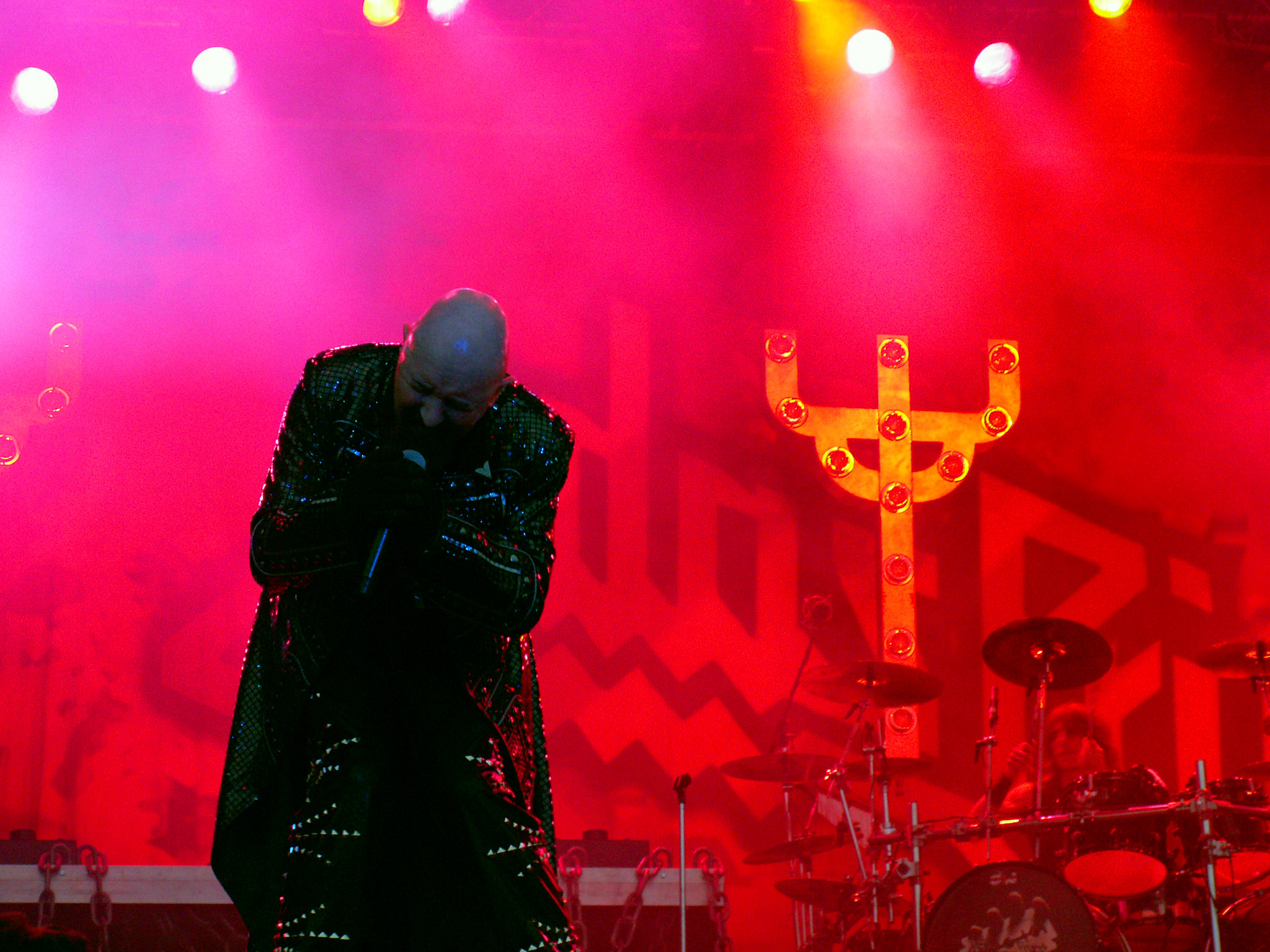 Judas Priest au Hellfest 2011